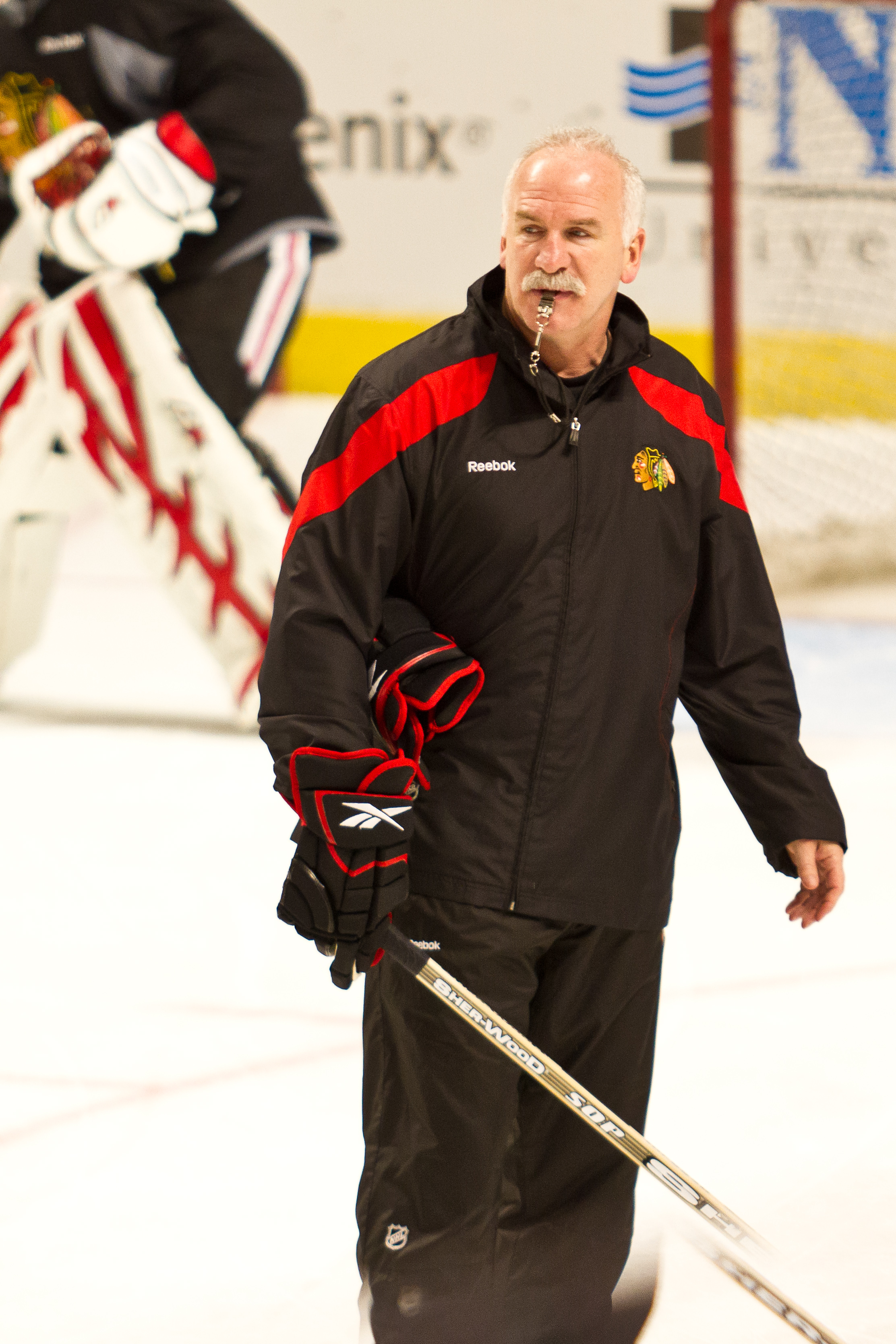 Coach Q